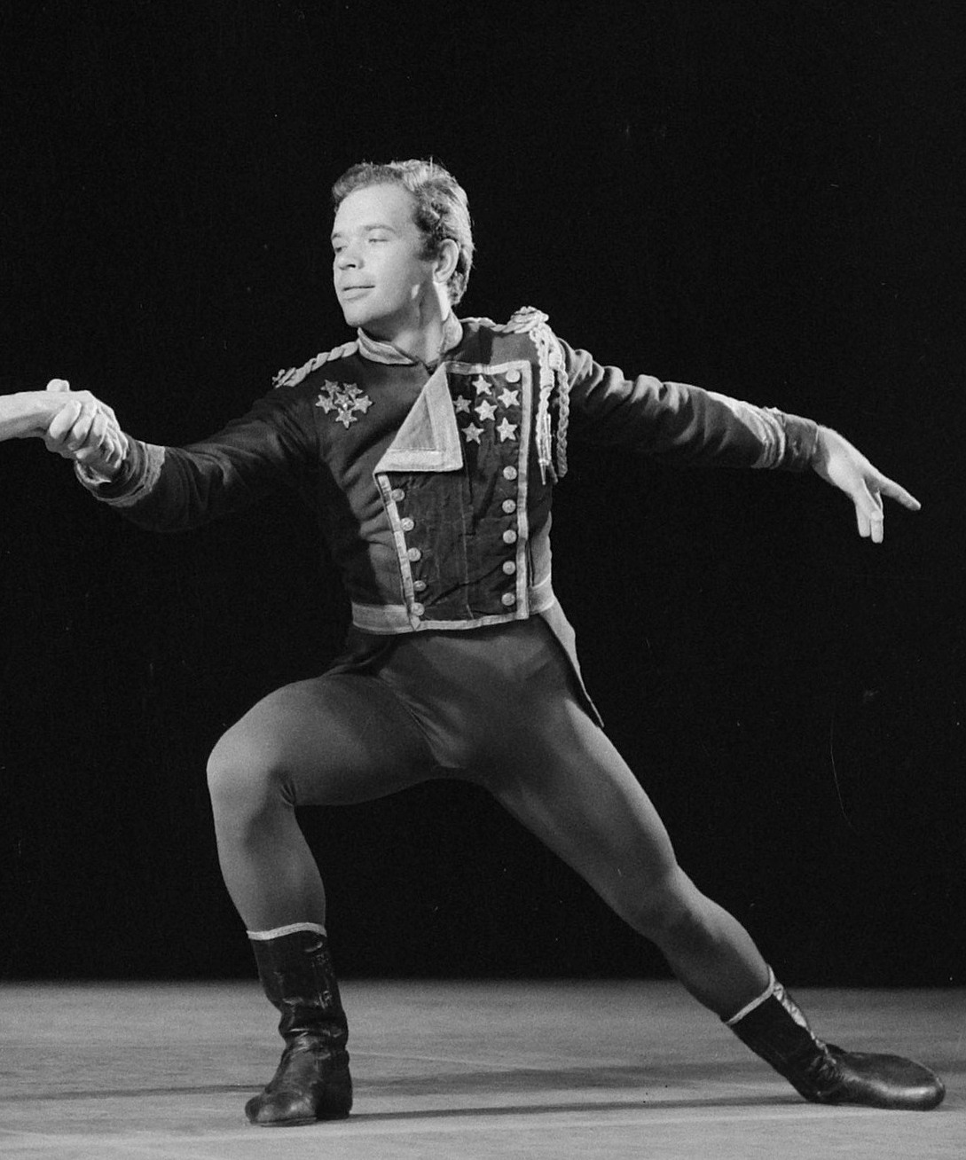 New York City Ballet in Amsterdam, Andre Prokowsky